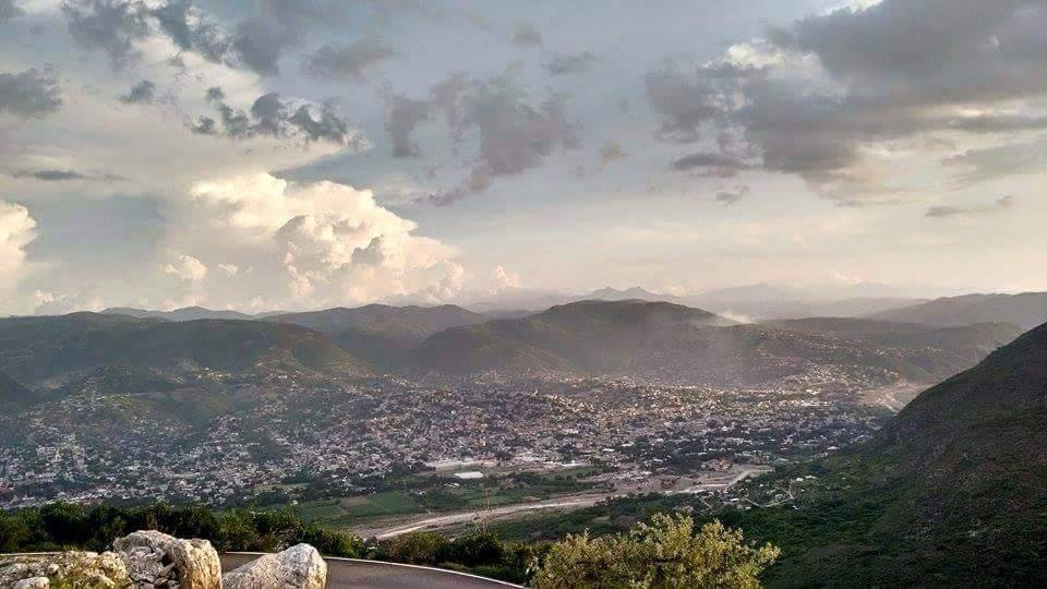 Principal ciudad de la región Montaña